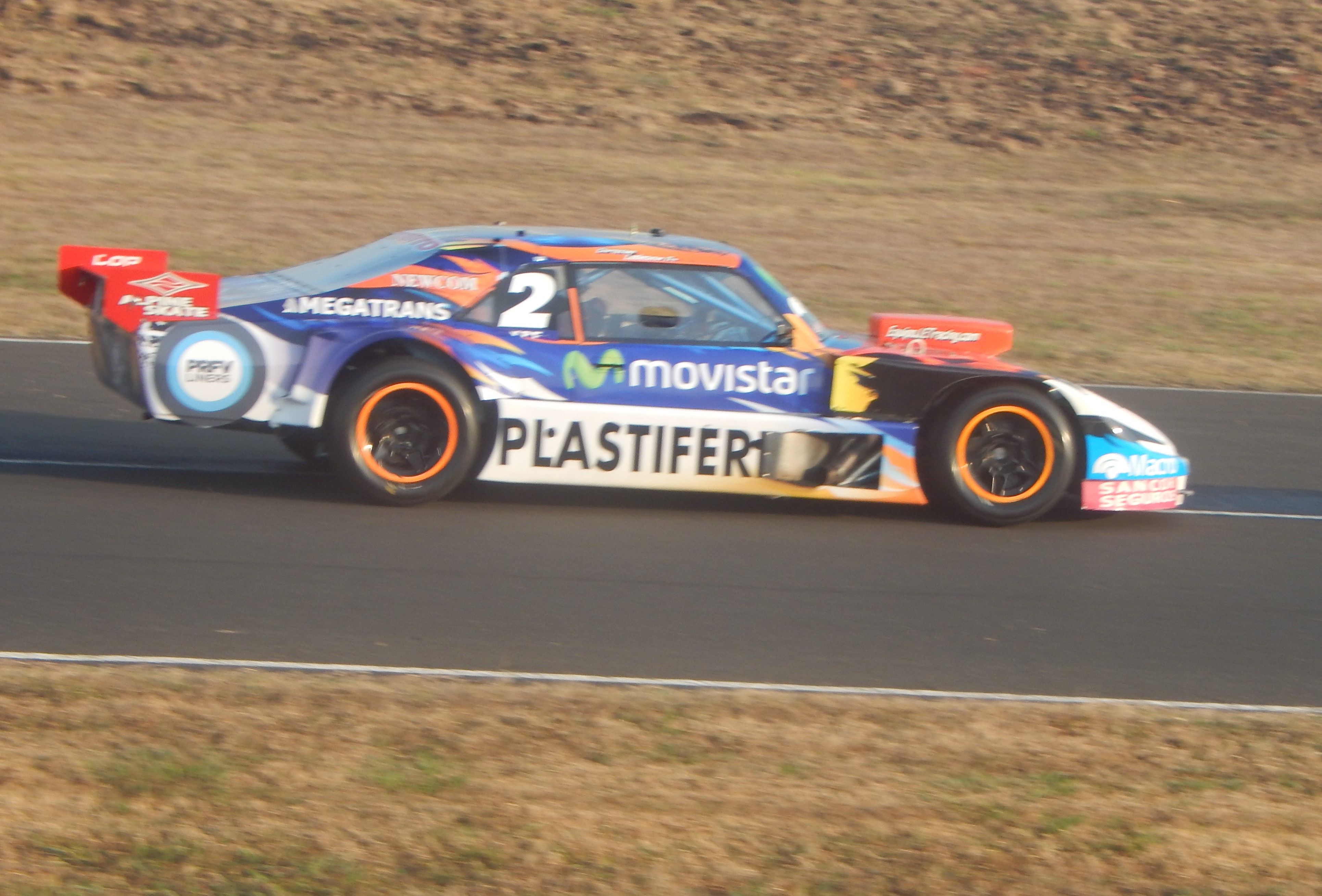 Christian Ledesma Paraná 2015